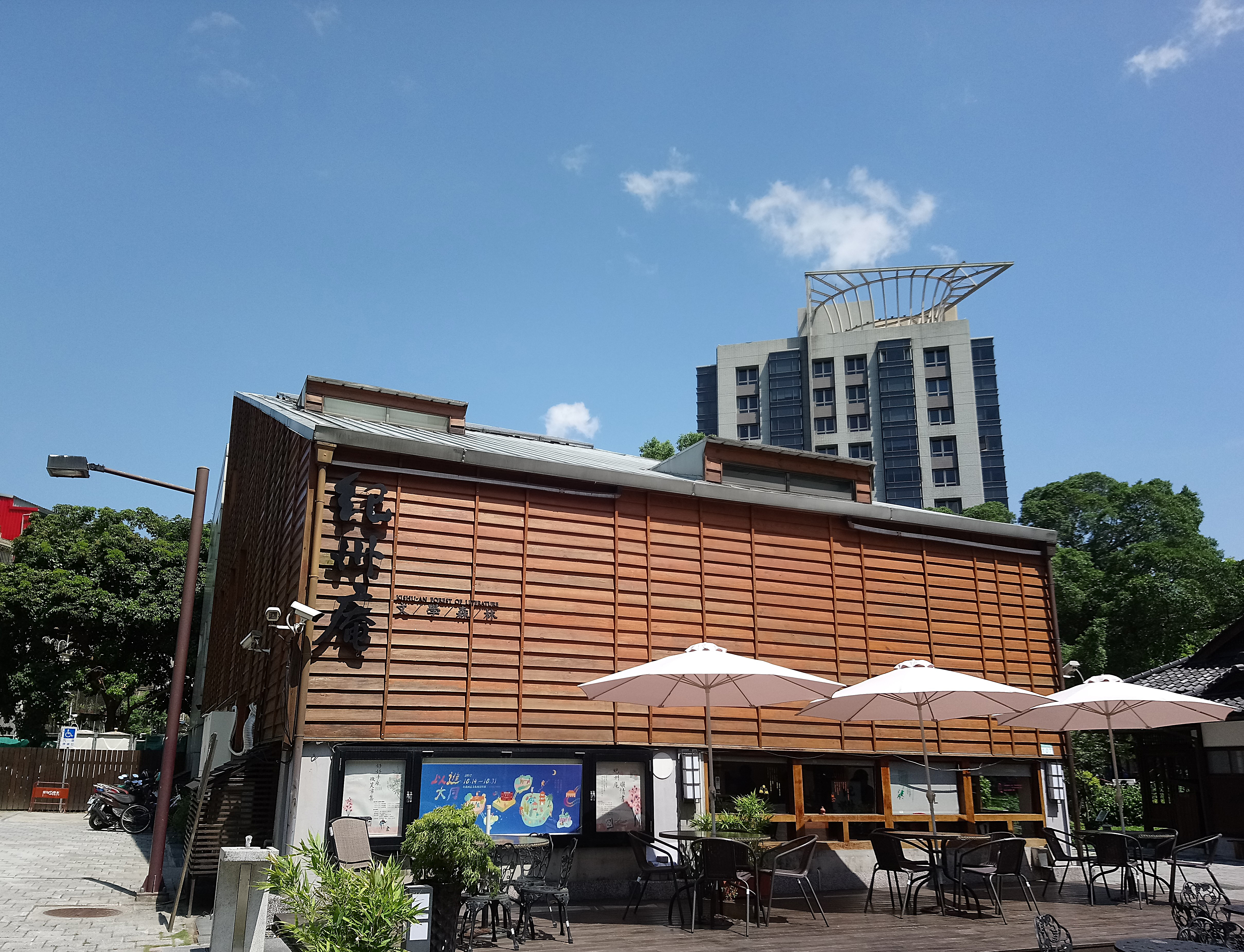 紀州庵新館,臺北市中正區古亭次分區河堤里